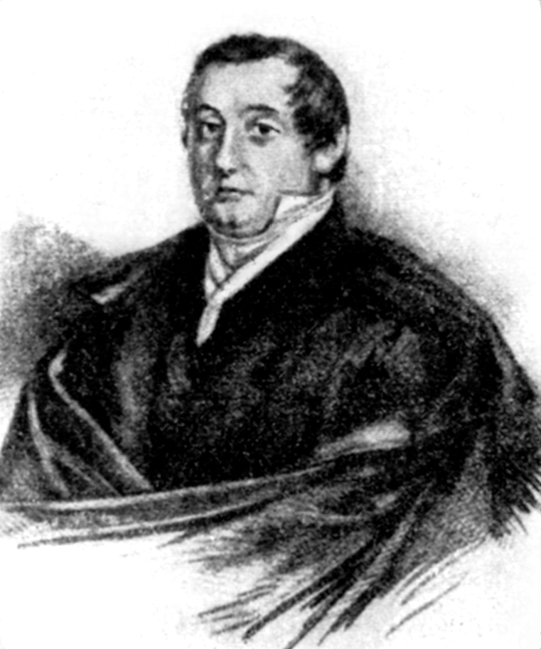 Михаил Григорьевич Павлов (1792—1840)